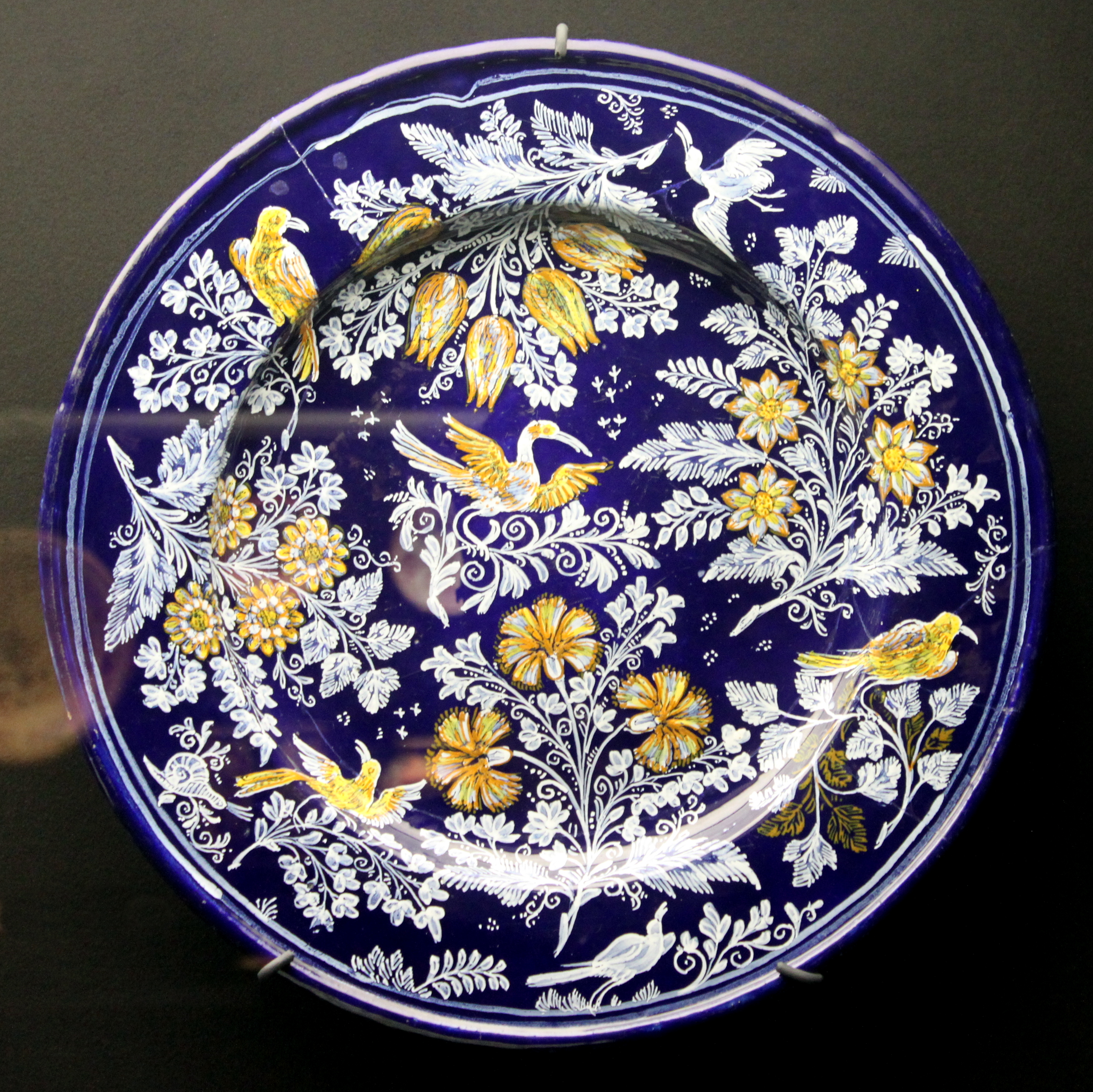 Ariana museum - islamic pottery imitation - Plat - Nevers (France) - 1670 - 1680 - Inventaire AR 12748 Faïence, polychromie de grand feu sur fond bleu. Le fond 'bleu persan" est orné de bouquets dans le style d'Iznik.